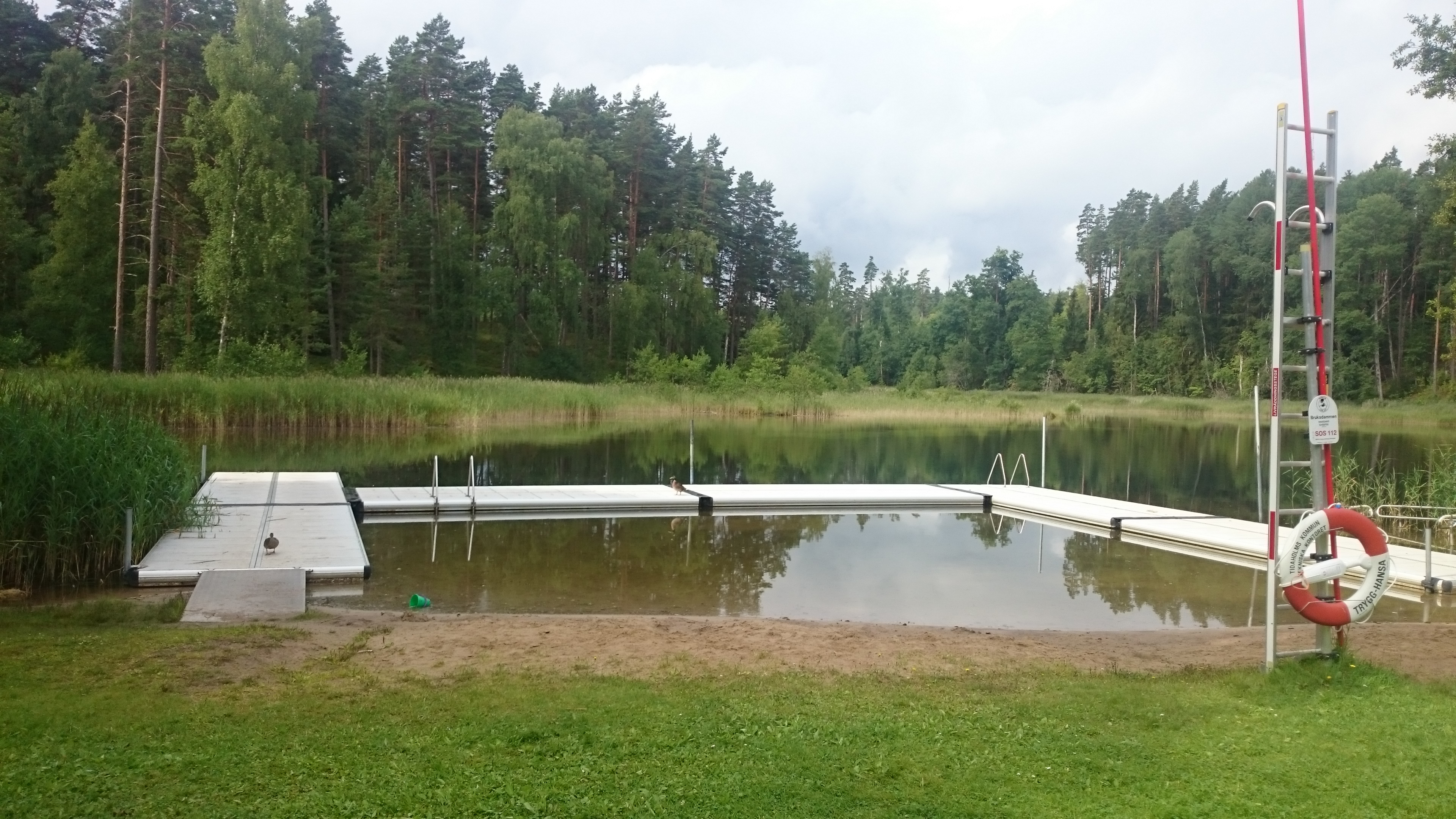 bruksdammen